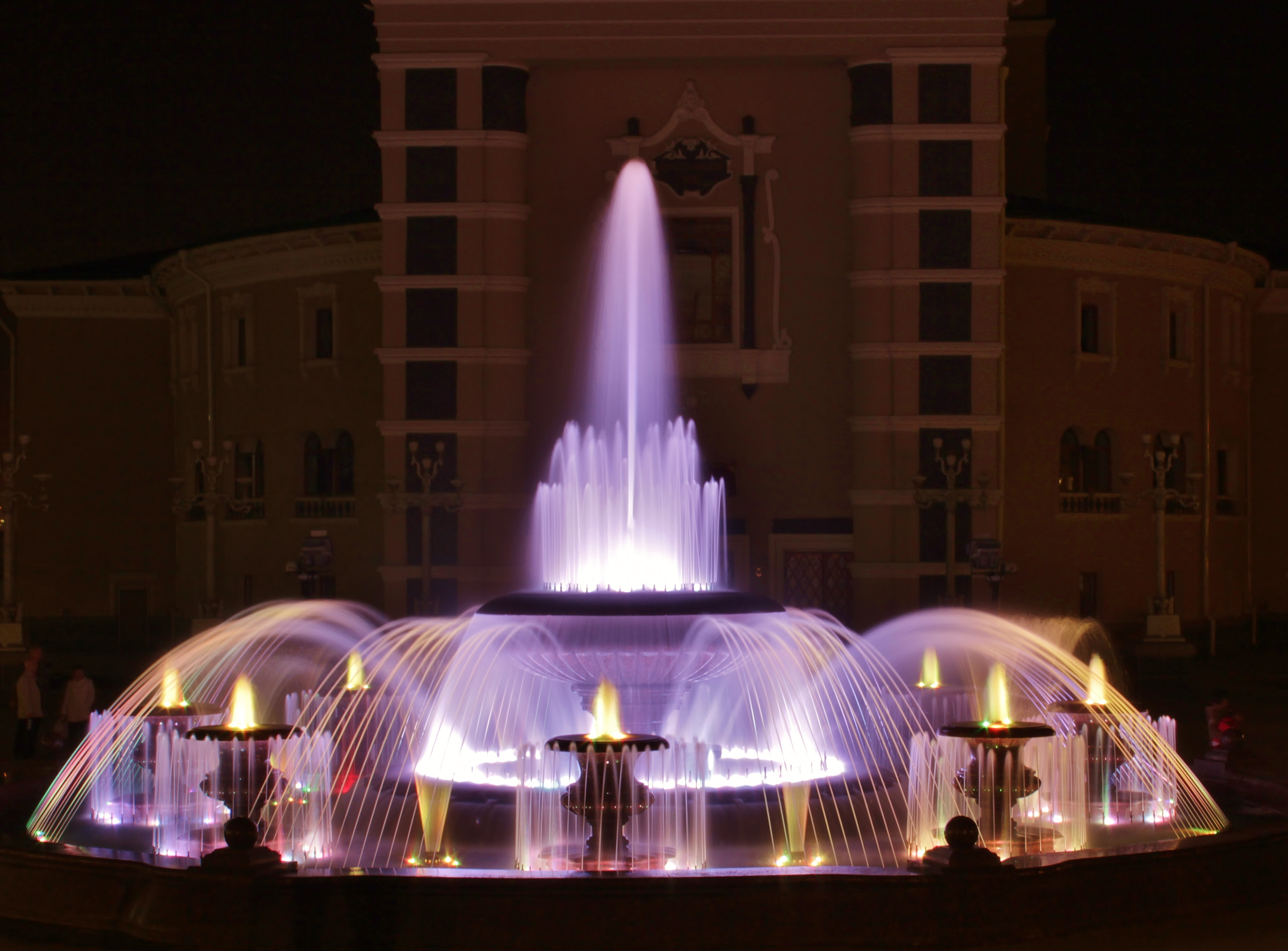 Фонтан на Театральной площади Улан-Удэ, рядом с театром оперы и балета